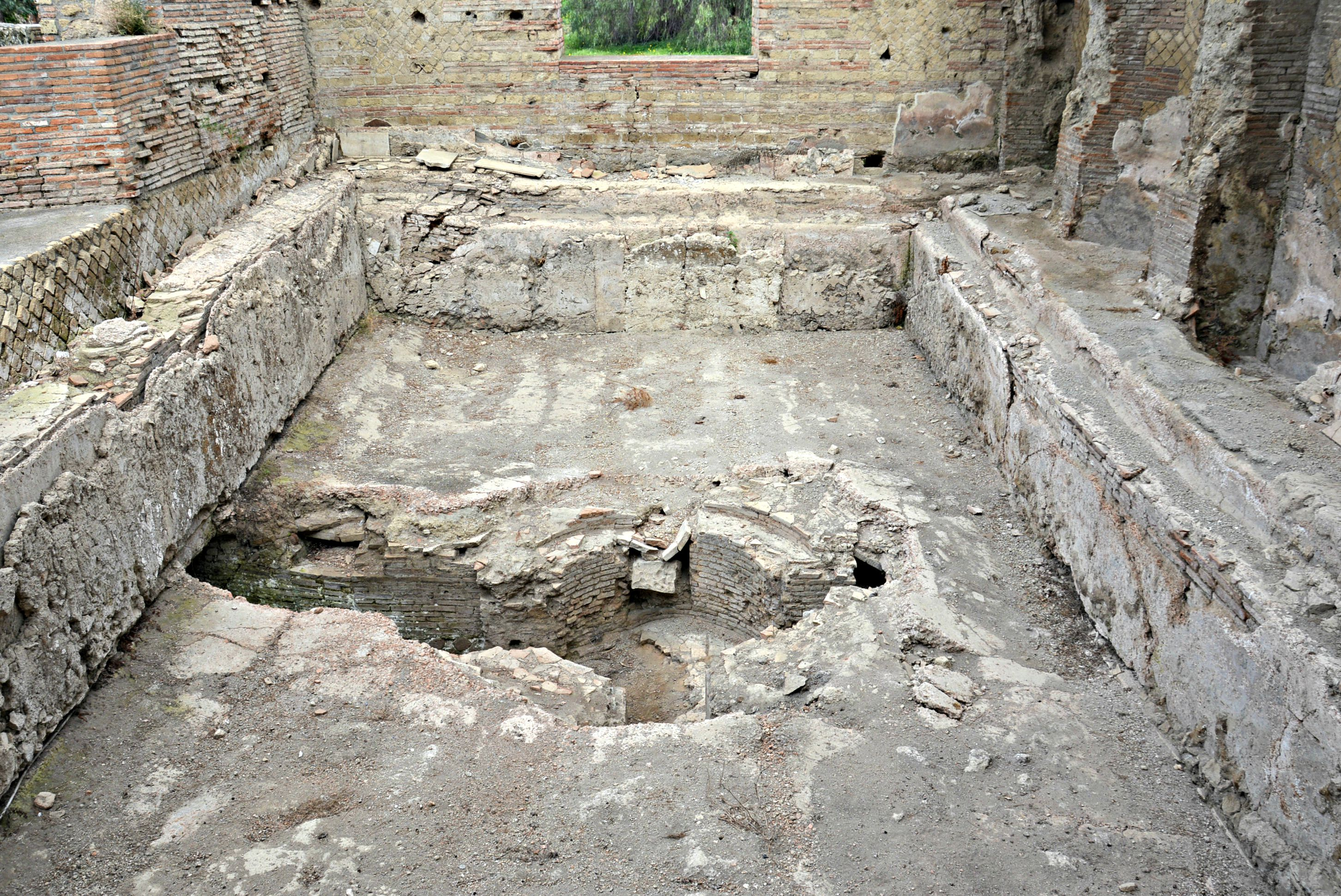 Terme Suburbane - MIBACT This is a photo of a monument which is part of cultural heritage of Italy.